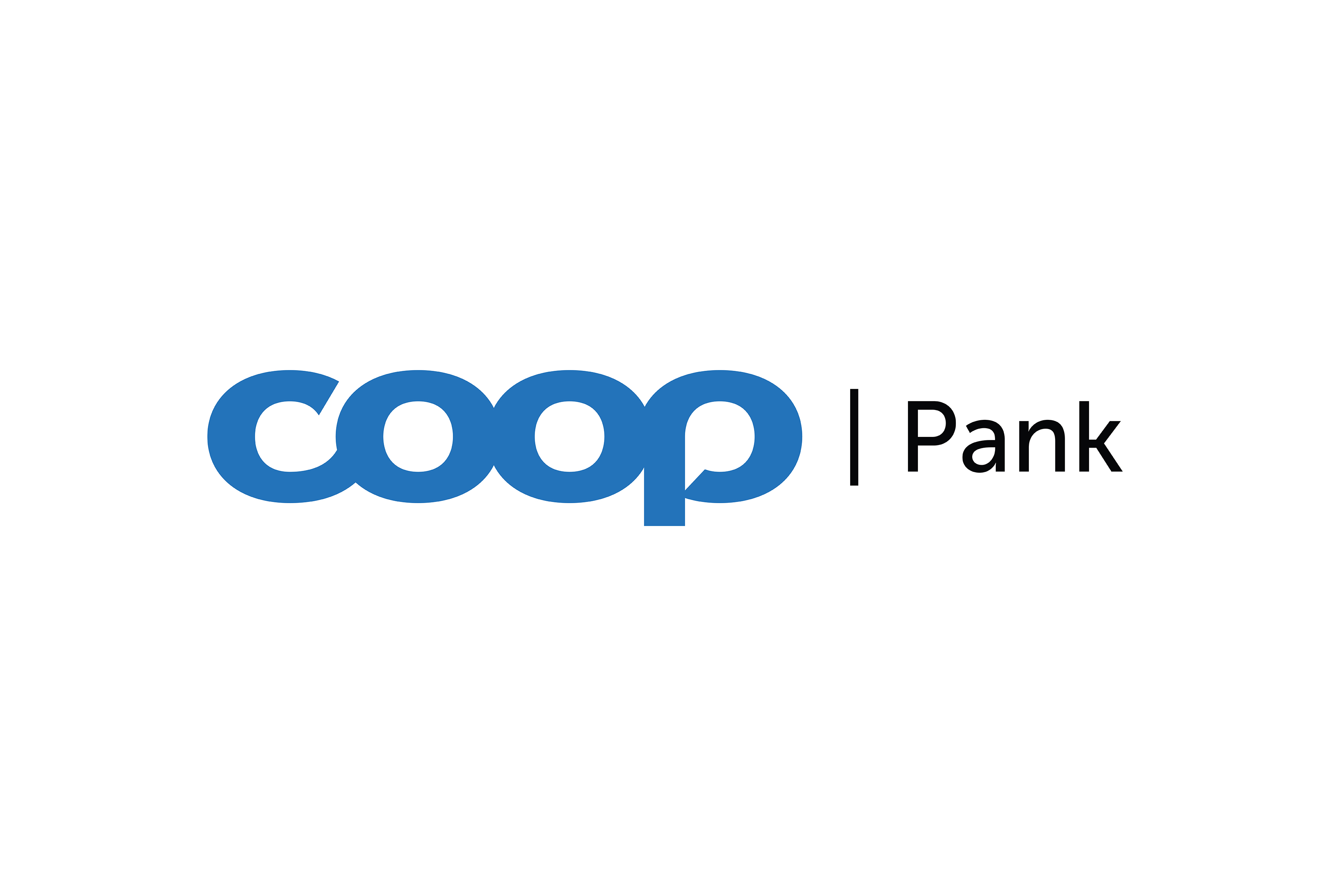 Coop Pank AS logo